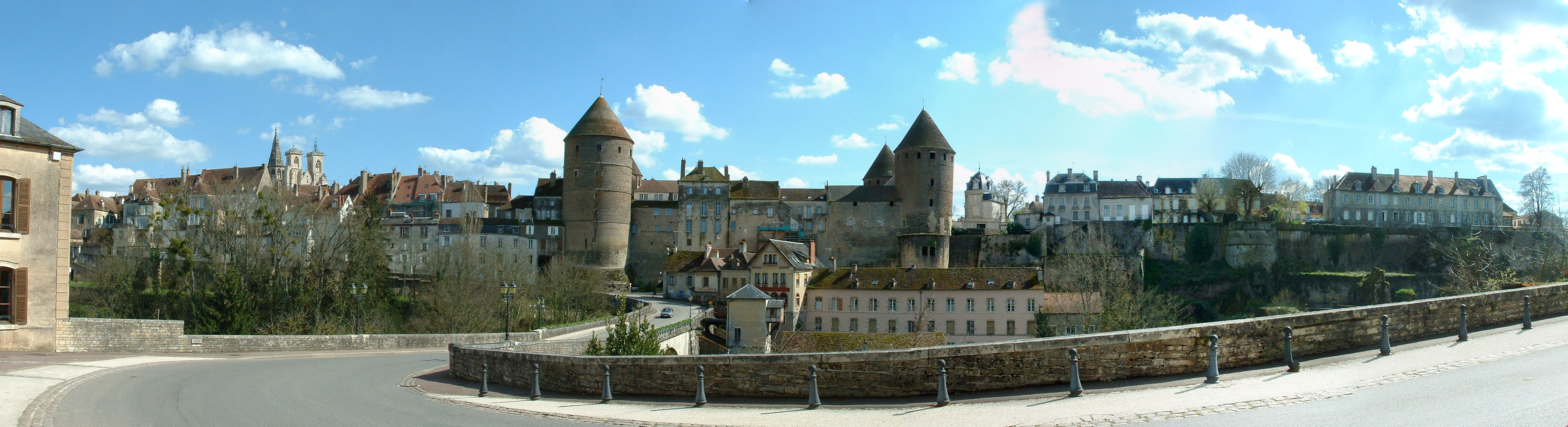 Semur-en-Auxois (21) - la vieille ville